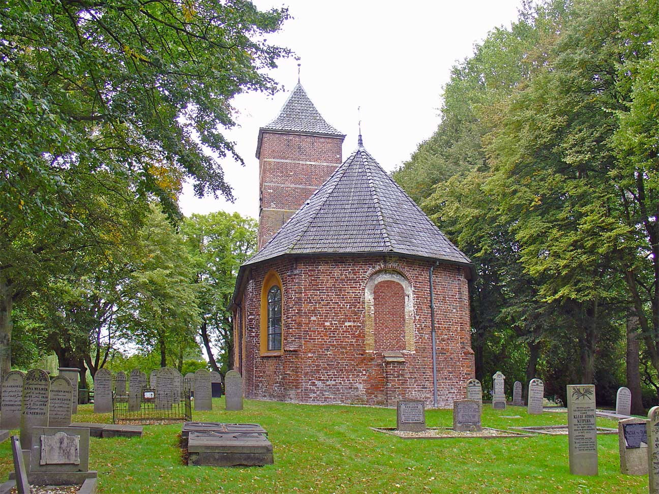 Stephanuskerk van Noorddijk